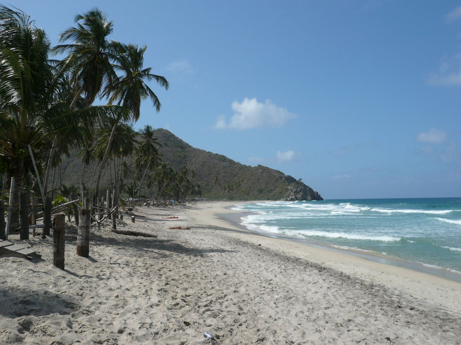 Cuyagua, estado aragua, venezuela